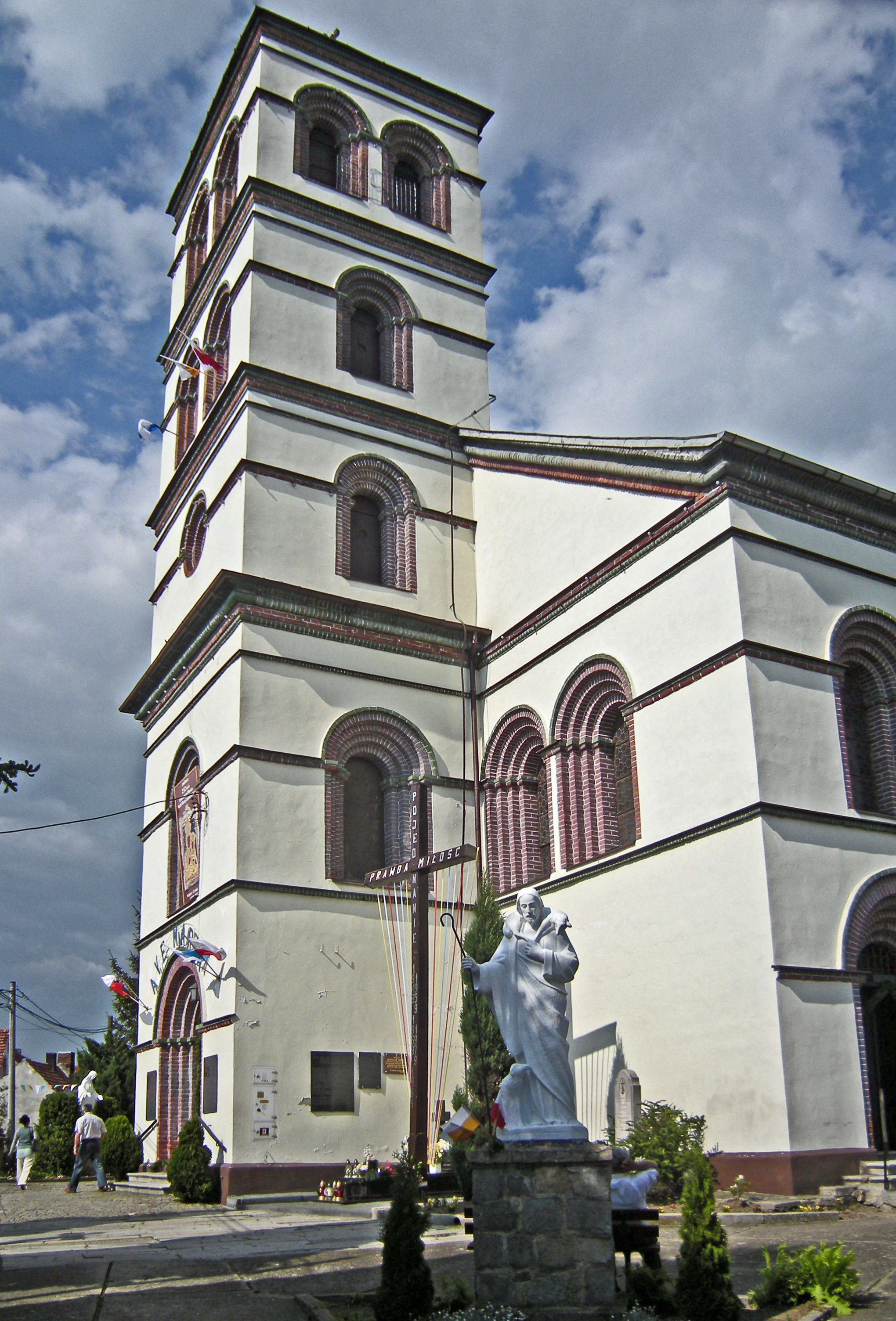 Kościół w Wójcicach, gmina Otmuchów